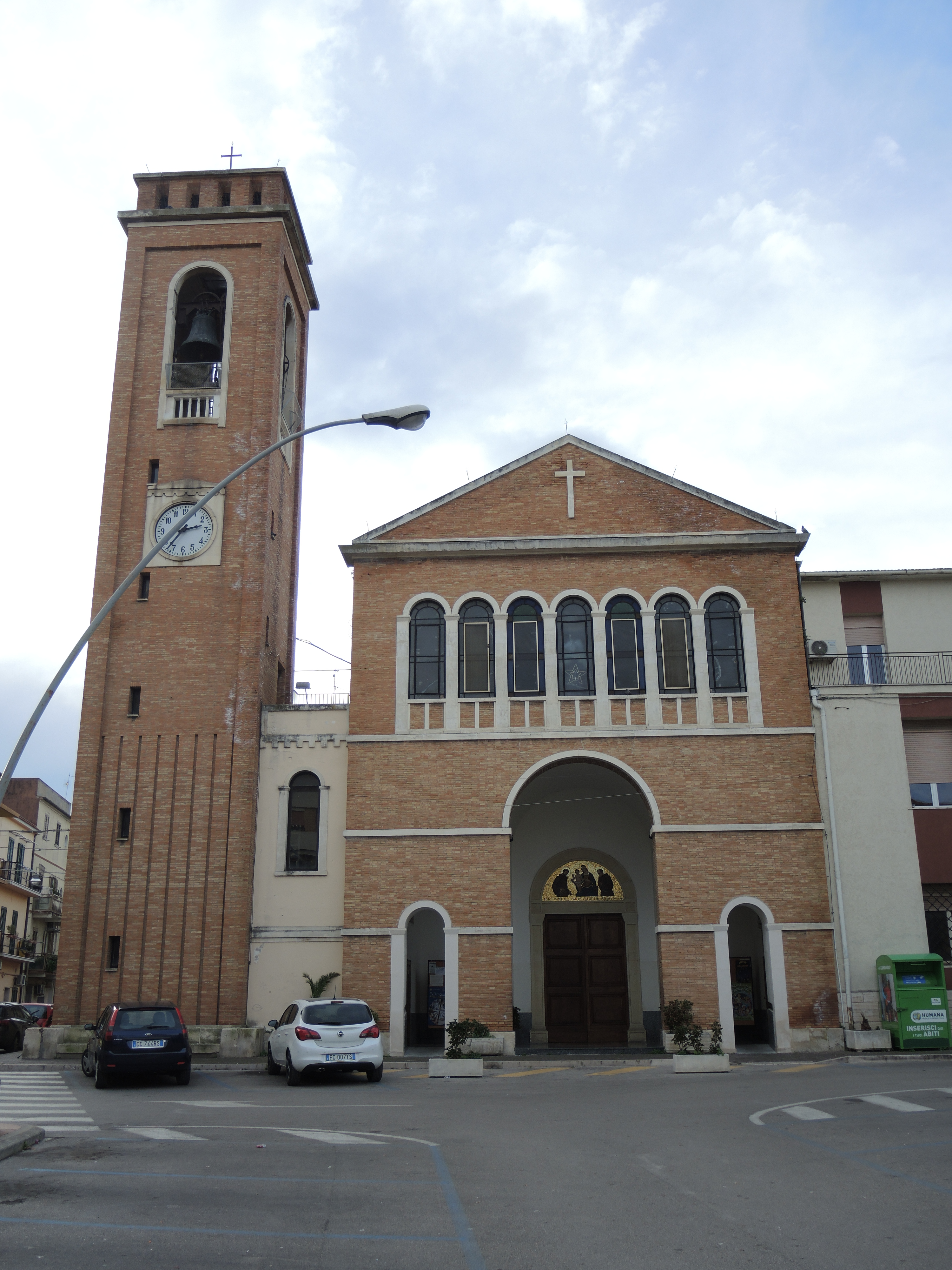 Ortona: Chiesa di Santa Maria delle Grazie